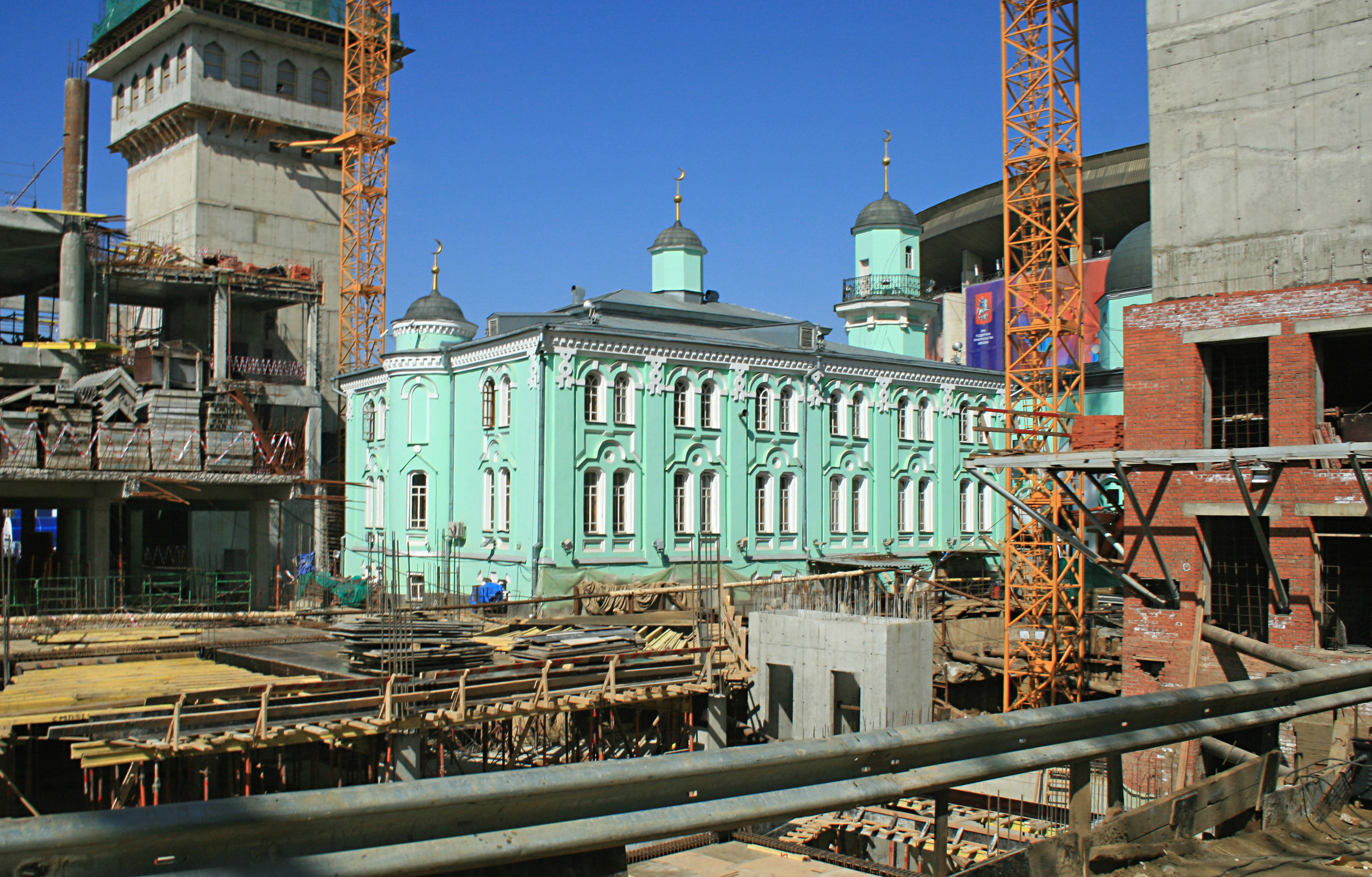 Московская соборная мечеть во время реконструкции